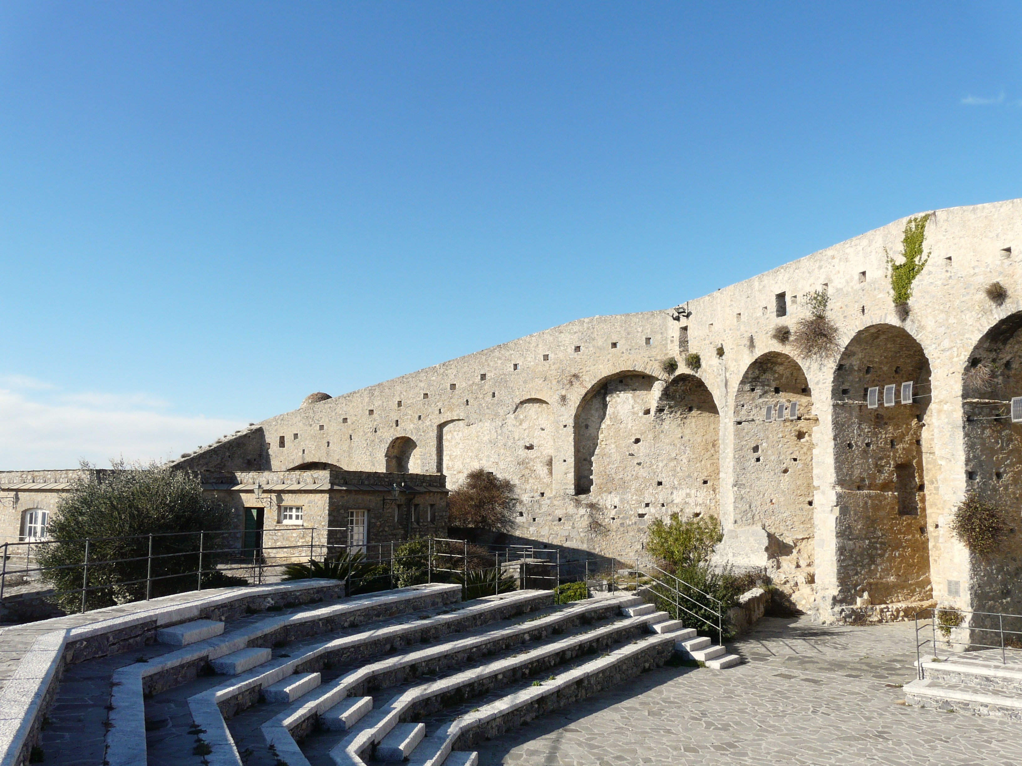 Castello Doria, Porto Venere, Liguria, Italia